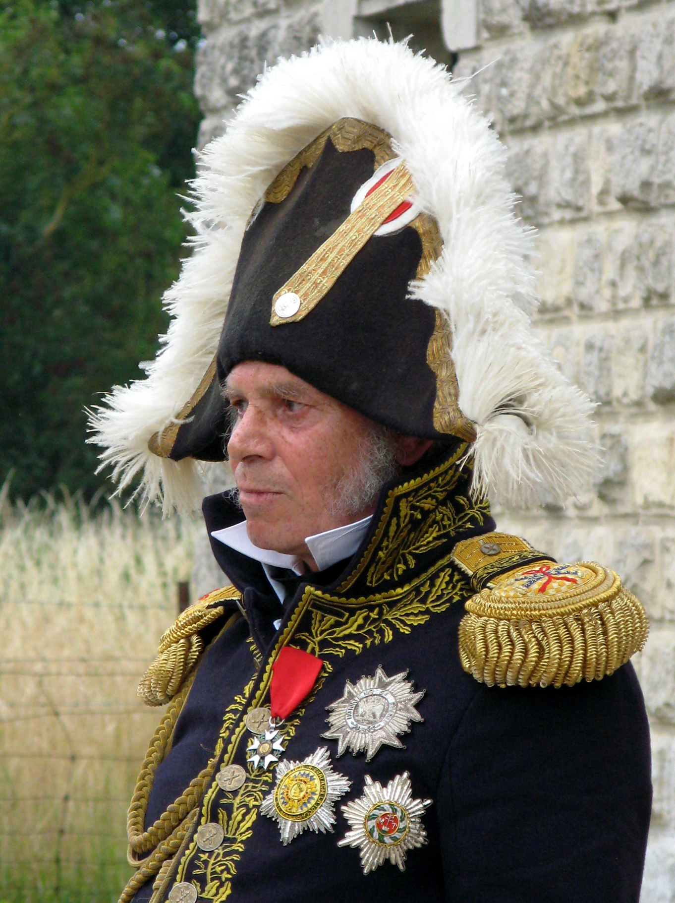 Maucourt (Somme, France) - Un bivouac napoléonien et une reconstitution historique furent organisés pour la fête communale de juillet 2010. Une répétition (le samedi en début d'après-midi) précède la première des 3 représentations prévues (une le samedi et deux le lendemain dimanche). .